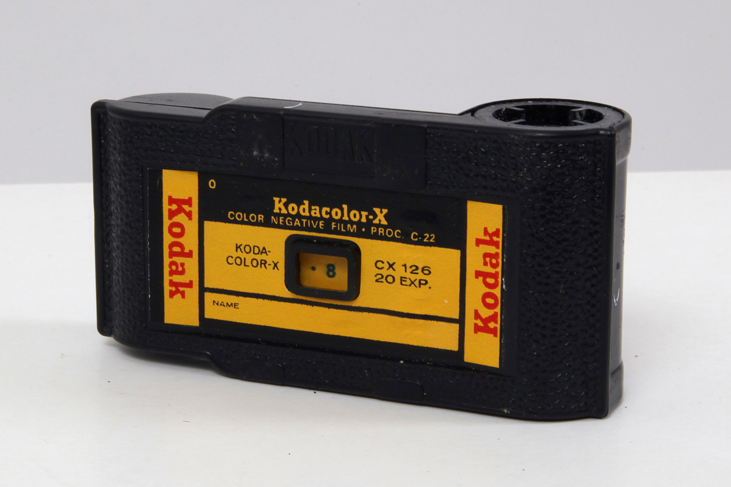 Film, Kasettenfilm Kodak 126